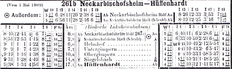 Fahrplantabelle der Strecke Neckarbischofsheim–Hüffenhardt von 1909